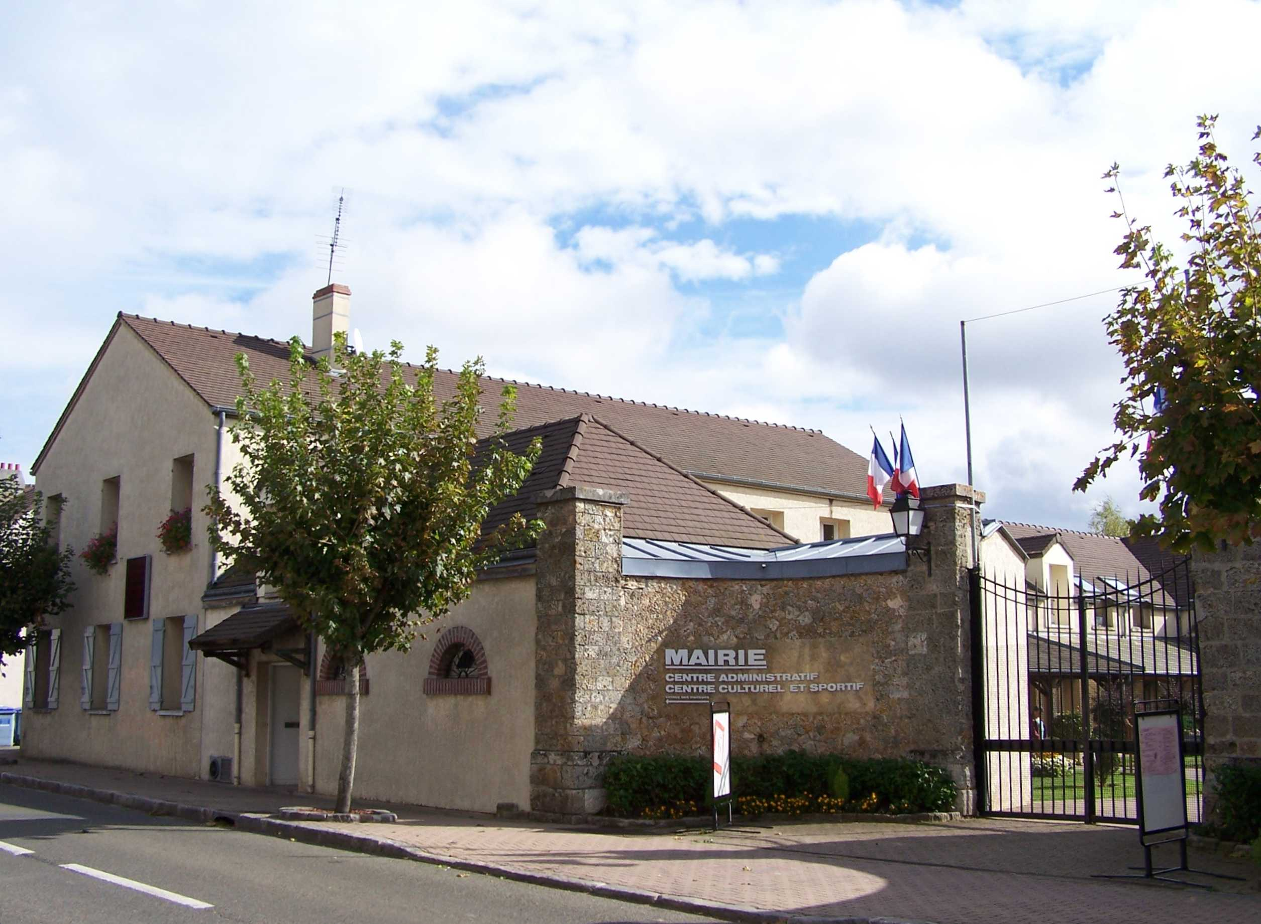 Hôtel de ville des Essarts-le-Roi (Yvelines, France)